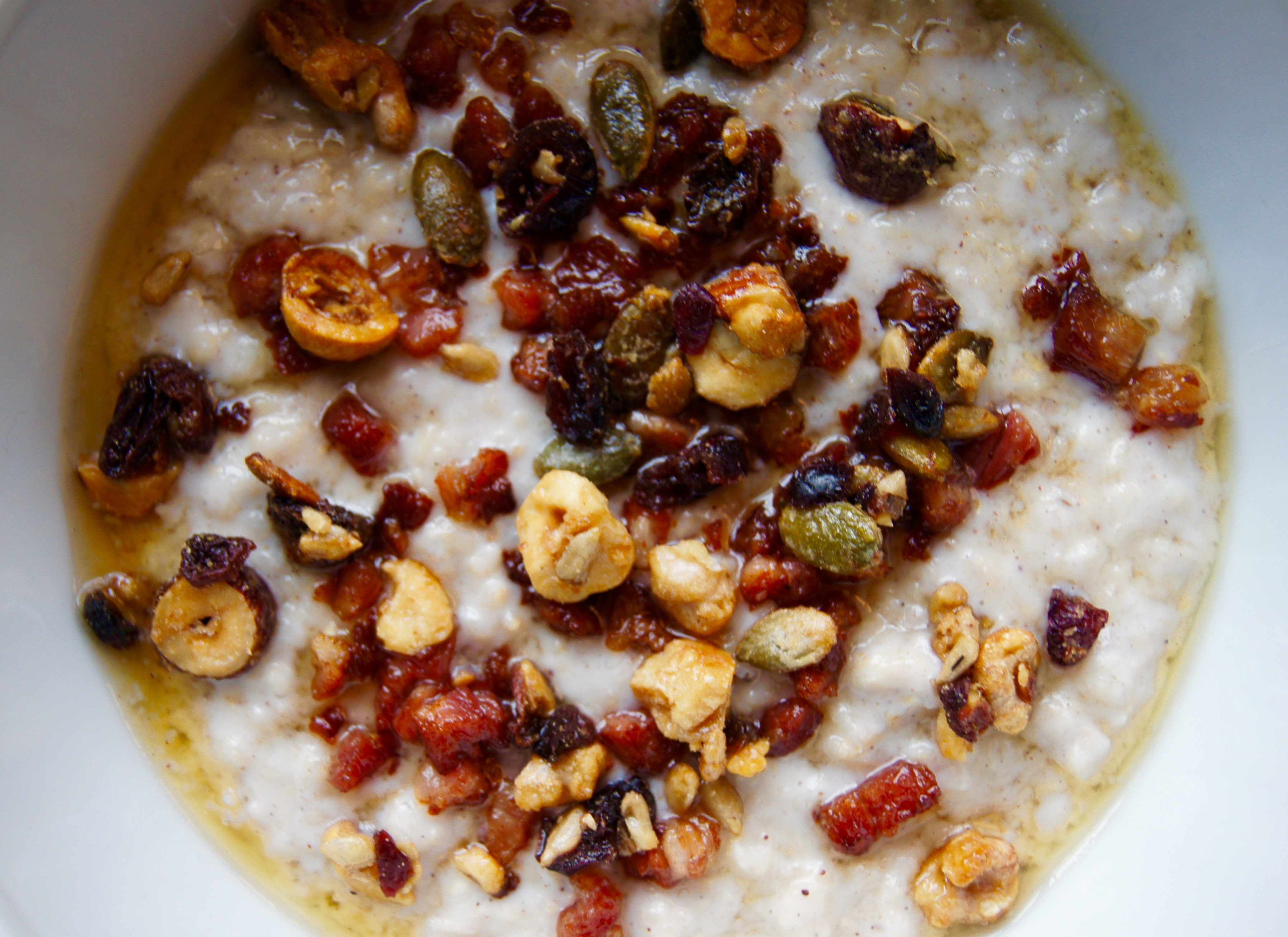 Havregrøt med bacon, granola og lønnesirup